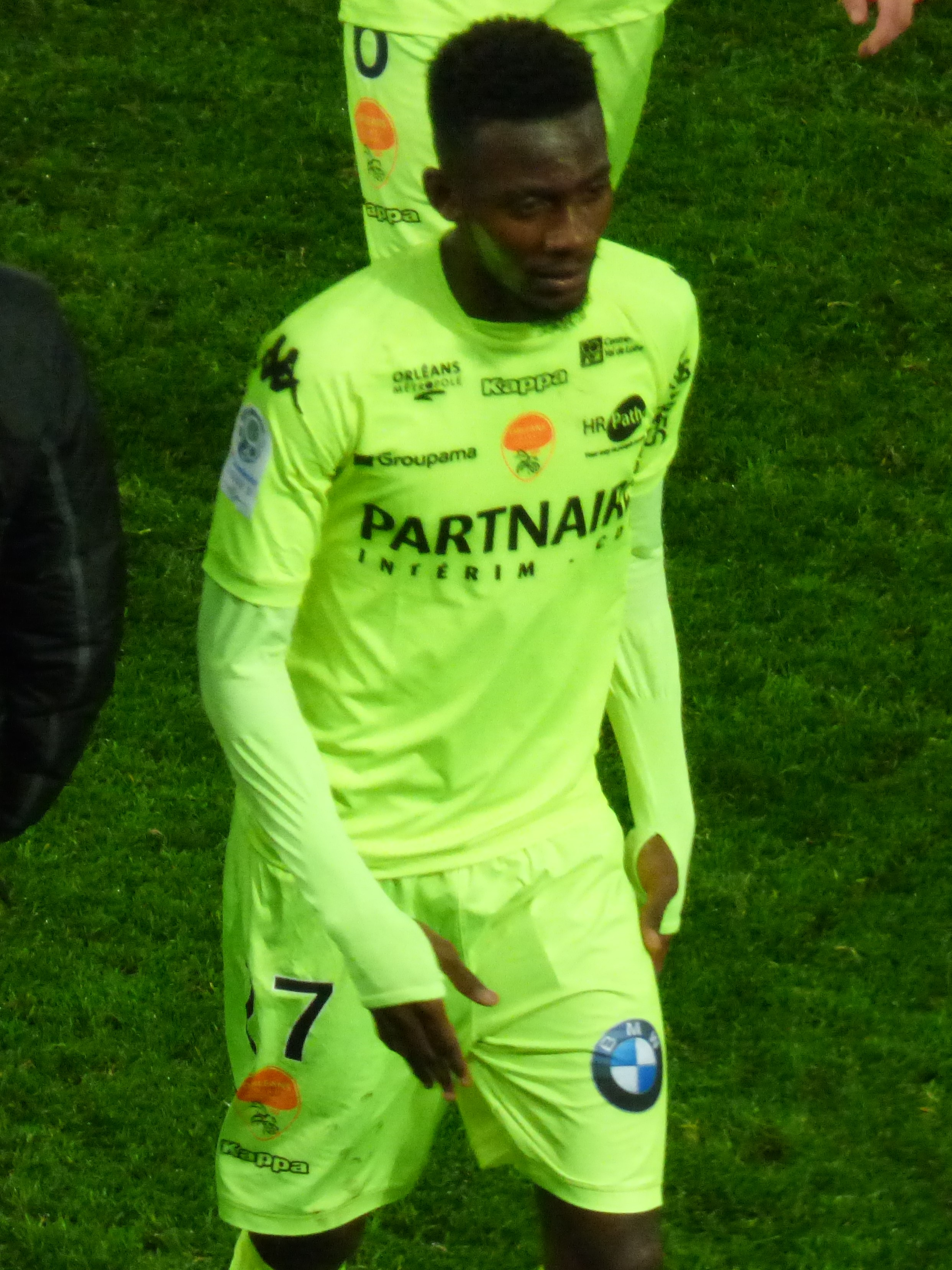 Issa Soumaré lors du match RC Lens / US Orléans, comptant pour la vingt-huitième journée du championnat de France de football de Ligue 2 2019/2020, le 9 mars 2020.